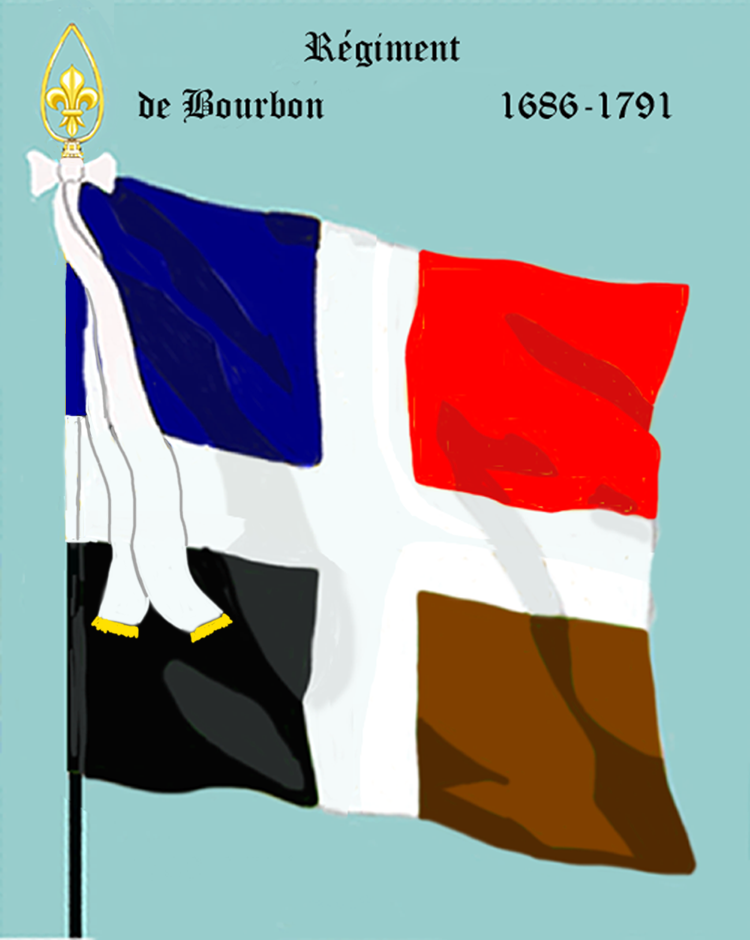 Ordonnanzfahne eines königlich französischen Infanterie-Regiments. - Entnommen und überarbeitet aus: „LES UNIFORMES ET LES DRAPEAUX DE L'ARMÉE DU ROI“ Marseille 1899. (Drapeau d'Ordonnance d' un régiment française d'infanterie royale.)